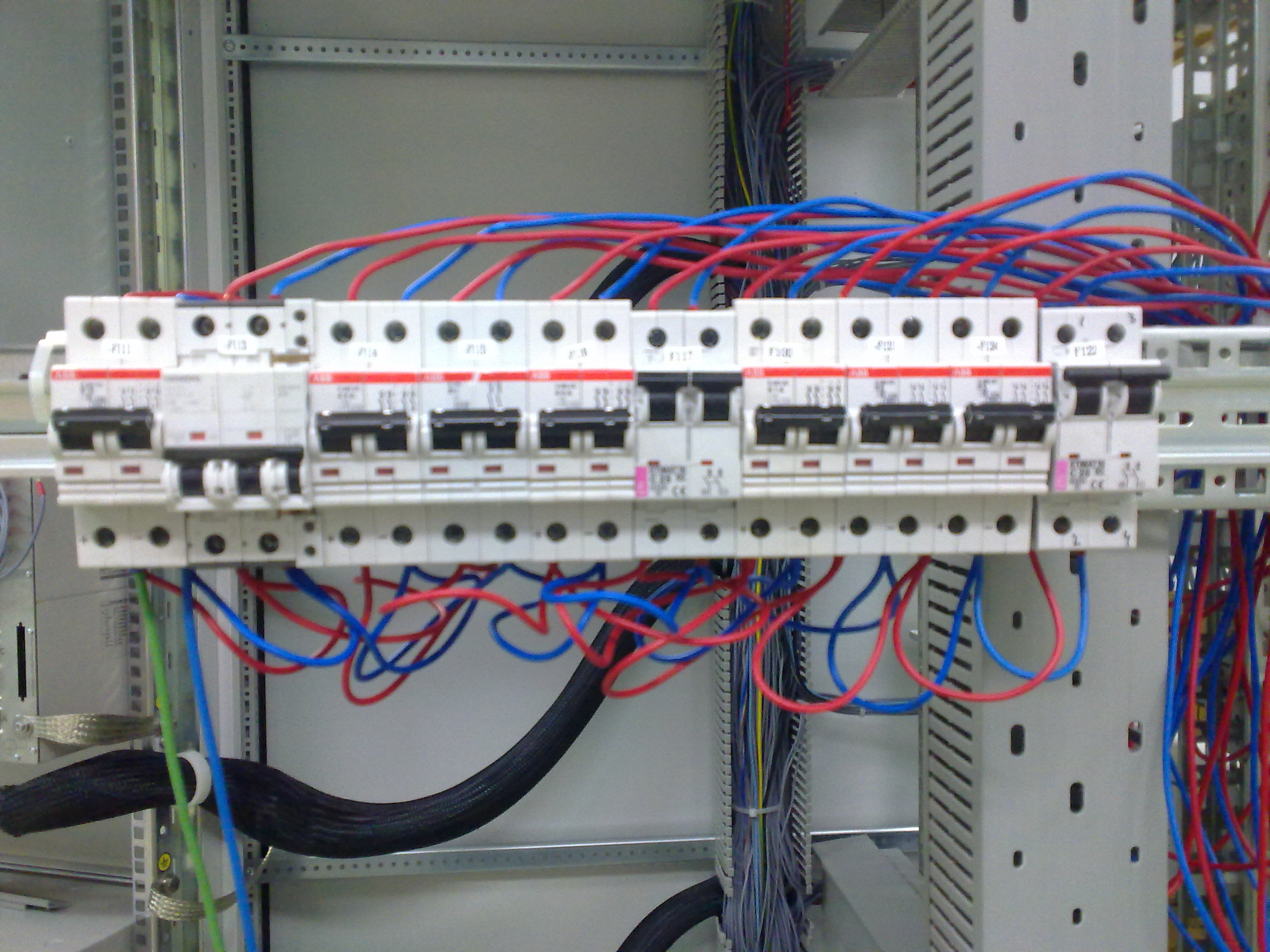 Zaščitne varovalke